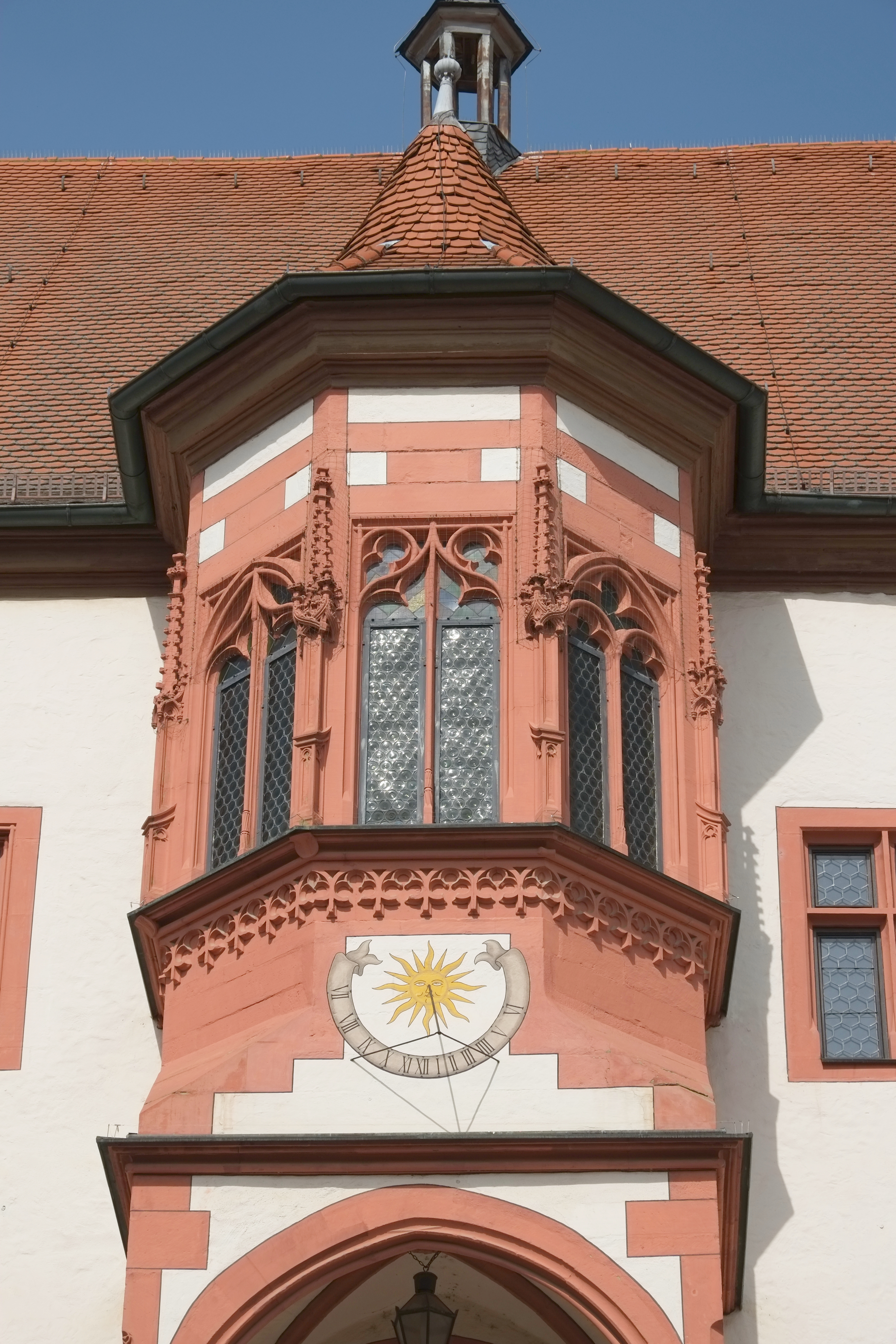 Rathaus in Dettelbach im Landkreis Kitzingen (Bayern, Deutschland)